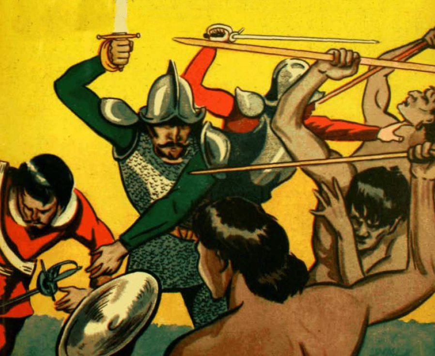 "Los catorce de la fama pelearon valientemente". En Chile se conoce como los catorce de la fama a miembros de la hueste de Juan Gómez de Almagro, alcalde de Santiago, que acudieron desde el fuerte de Purén al encuentro del gobernador Pedro de Valdivia enfrentado con los guerreros mapuches de Lautaro en la Batalla de Tucapel, en la cual el conquistador español finalmente sería derrotado y muerto. La epopeya de estos catorce bravos, peleando sin descanso, muchos de los cuales perecieron en el combate, ha pasado a la historia con el honroso título de "los catorce de la fama"